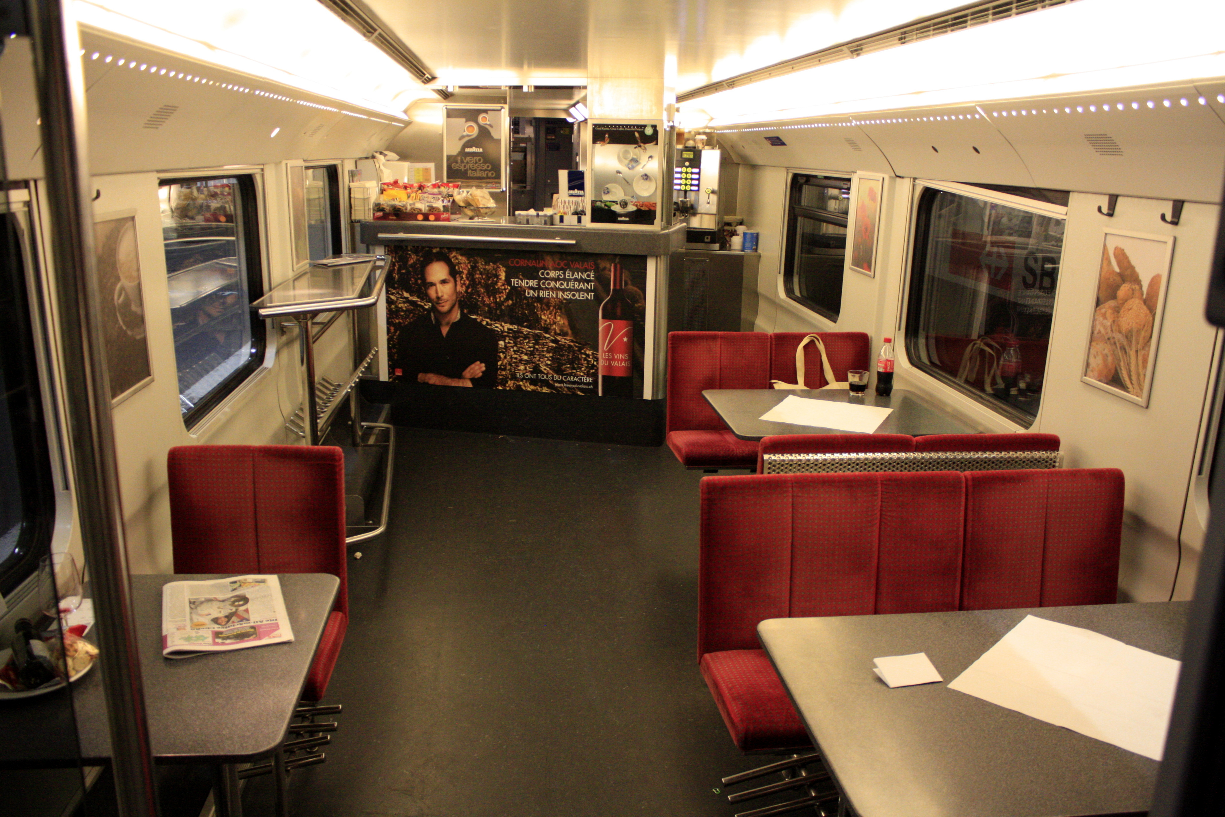 Bistrobereich eines IC2000-Bistrowagens der SBB